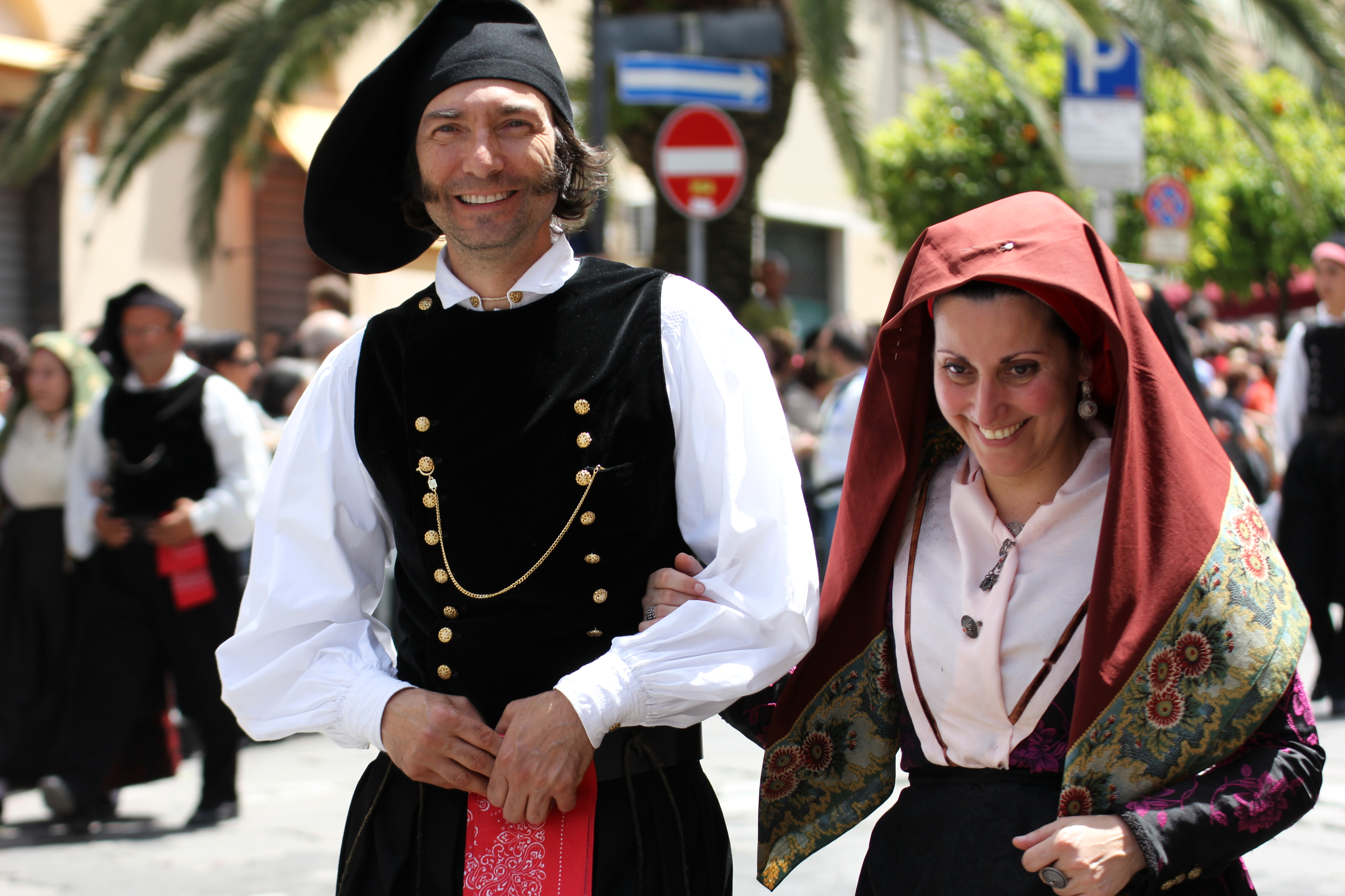 Costume tradizionale